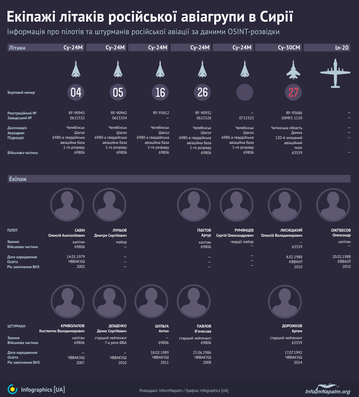 Інфографіка від Inform Napalm. Екіпажі літаків російської авіагрупи в Сирії